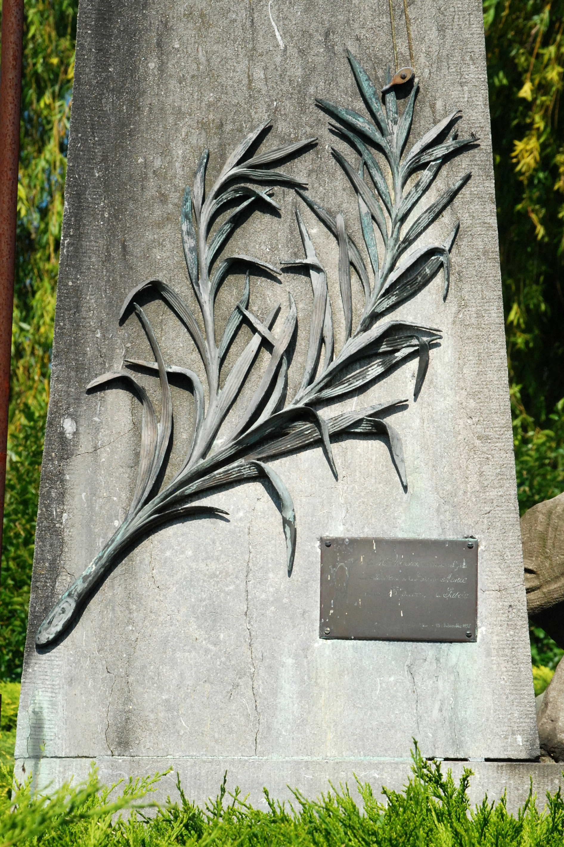 Belgique - Brabant wallon - Lasne - Plancenoit - L'Aigle blessé (bataille de Waterloo)